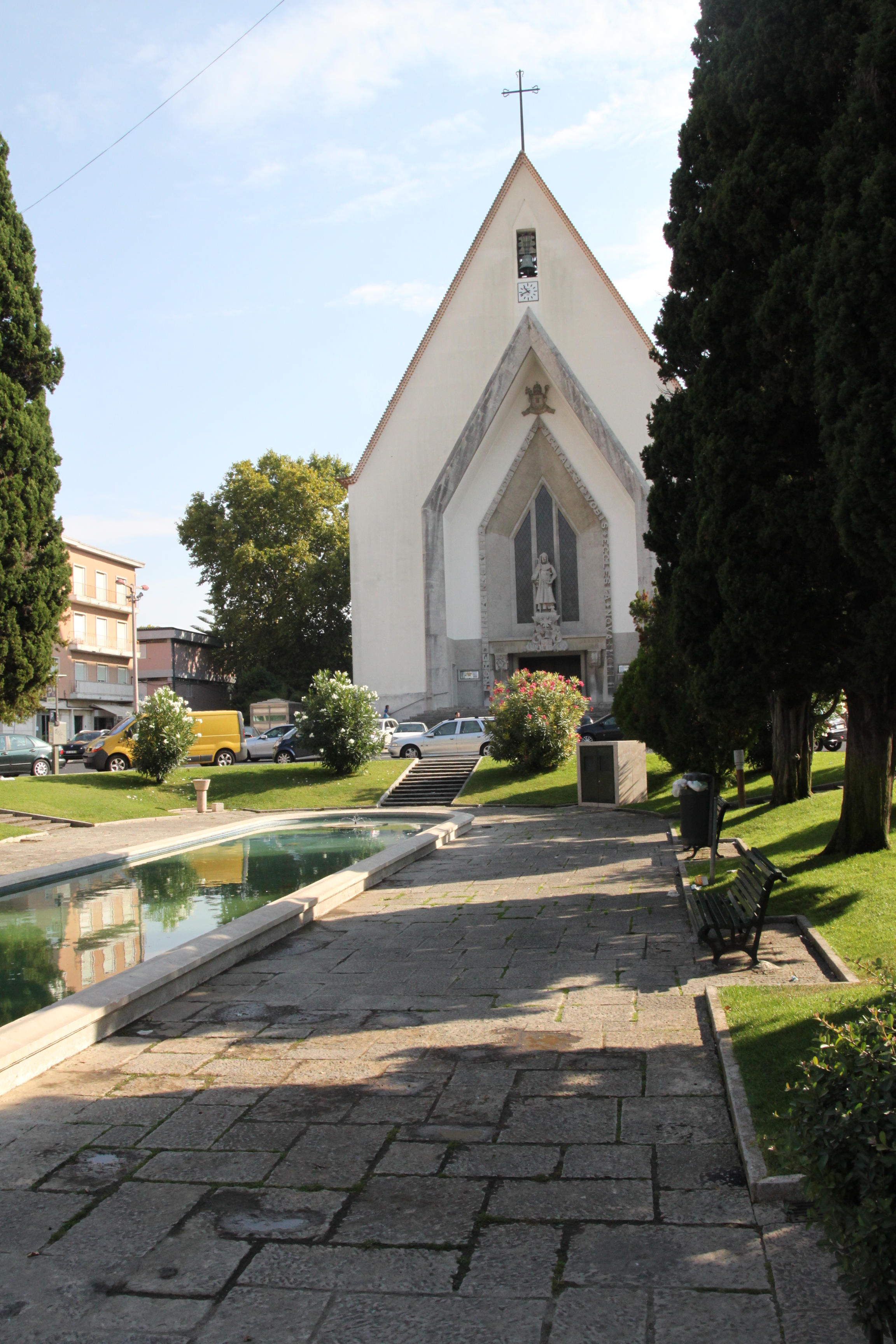 Jardim do Largo Frei Heitor Pinto This file was uploaded for Wiki Loves Monuments in Portugal with the unique identifier 97026712.